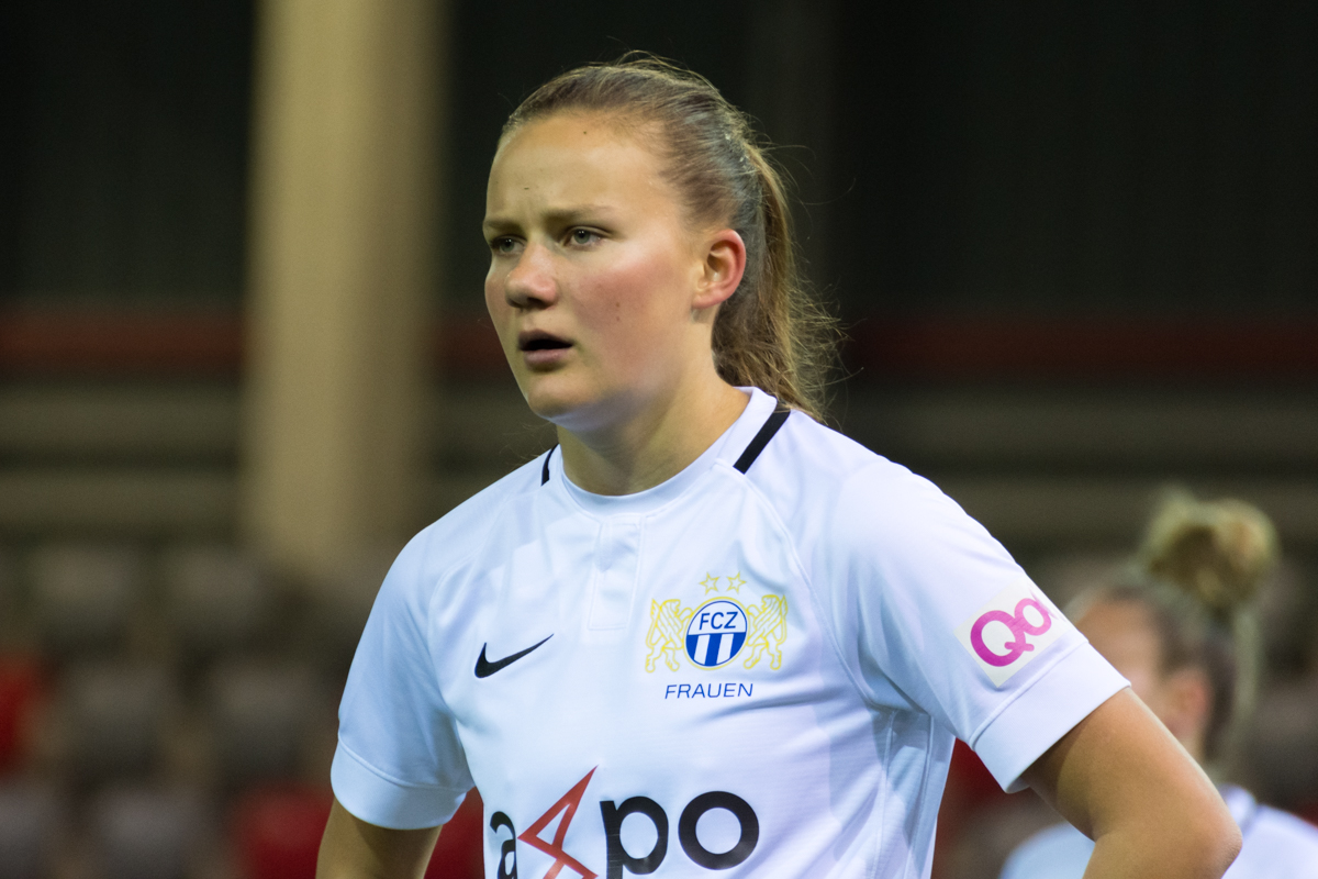 Malin Gut vs FC Bayern München